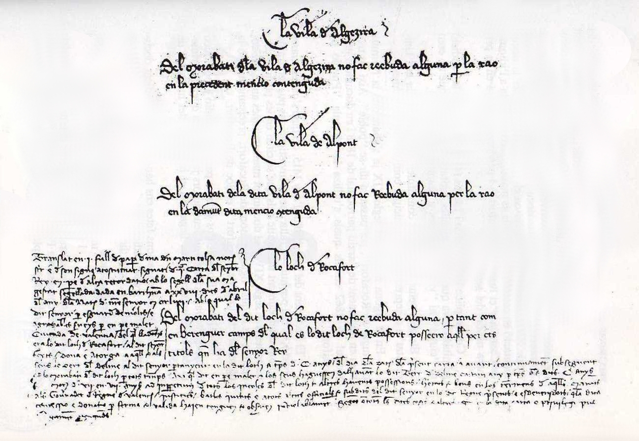 Document més antic que es coneix on figura el nom de Rocafort: Lo Loch de Rocafort: "Del morabatí del dit loch de Rocafort no faç rebuda alguna per tant com en Berenguer Camps del qual es lo dit loch de Rocafort pot feero aquell per cert títols que ha del Senyor Rei".